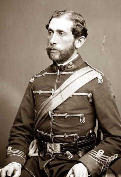 Utassy Frigyes György magyar és amerikai szabadságharcos, üzletember.